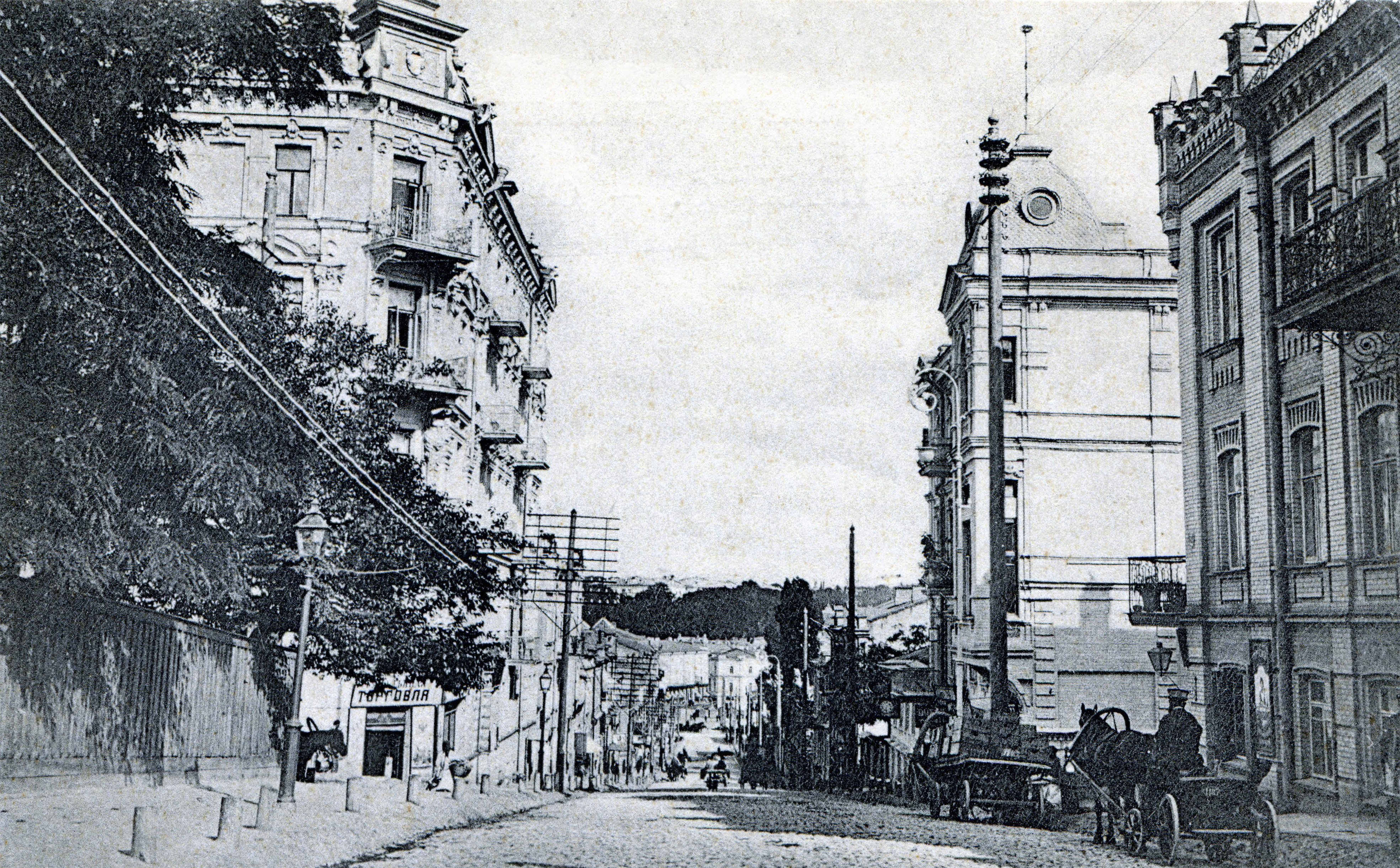 Будинок прибутковий, Київ, вул. Софійська, 17/15